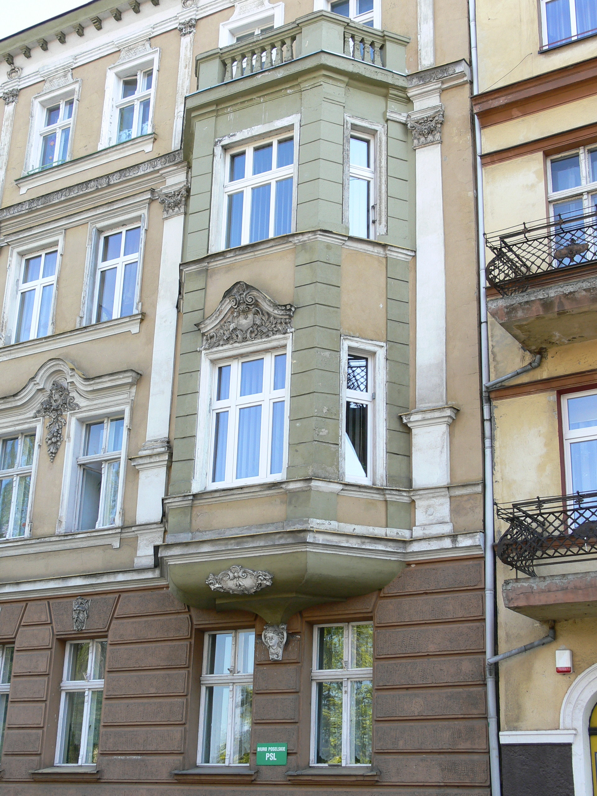 Racibórz - kamienica przy ul. Staszica 19, wykusze